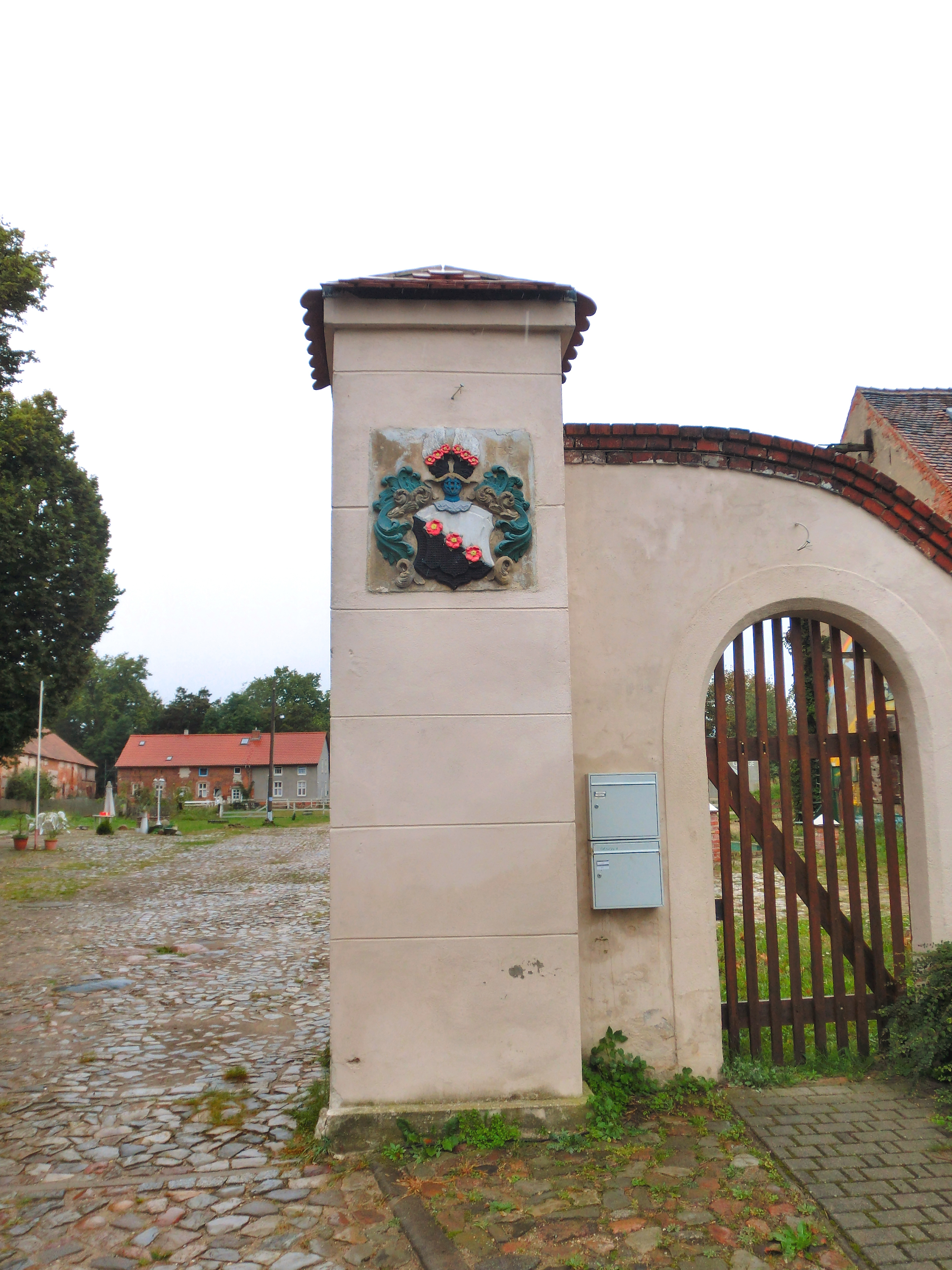 Kehnert Gutshaus Tor